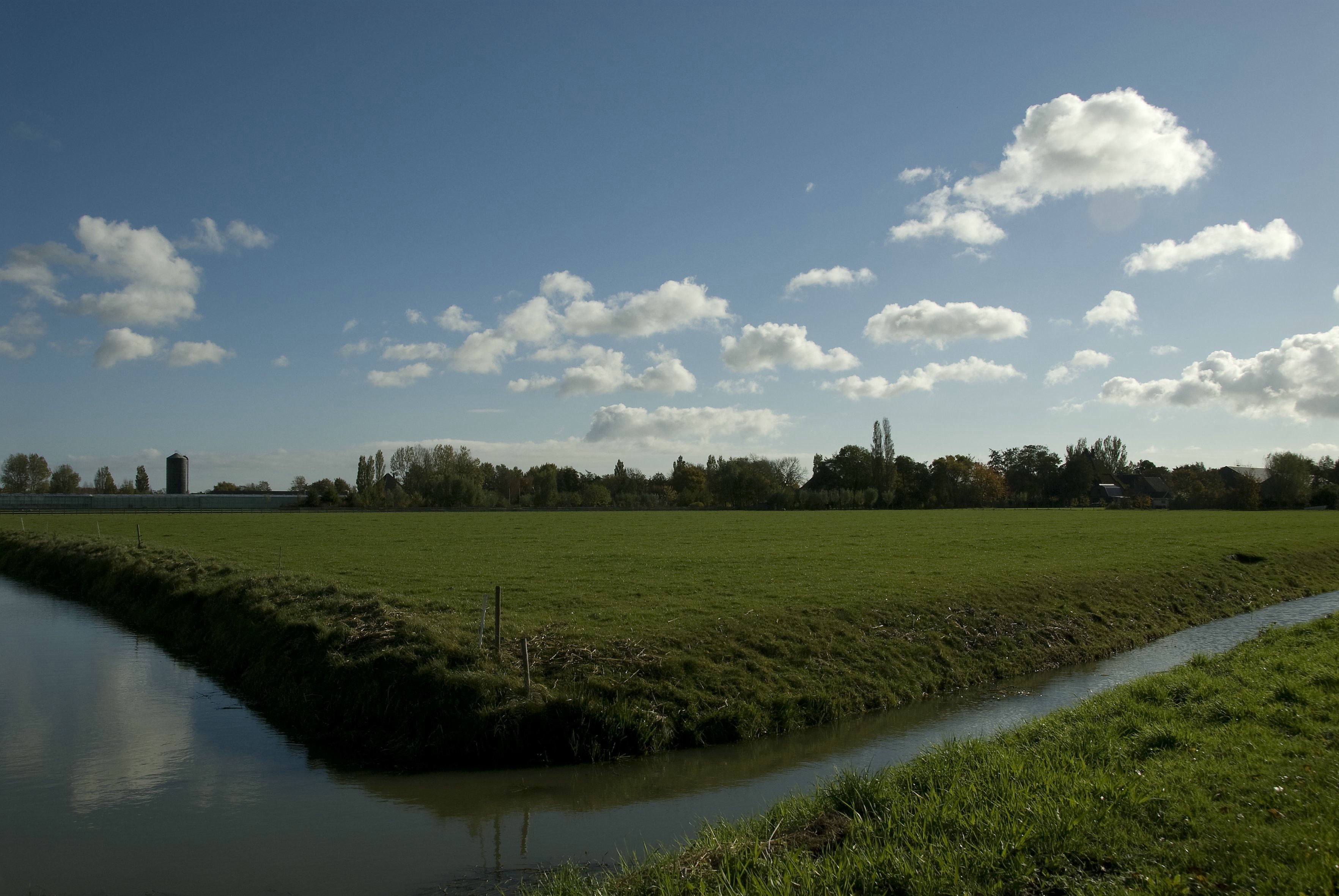 Voormalig gemaal Grootslag II: Weidelandschap, gezien vanaf de dijk